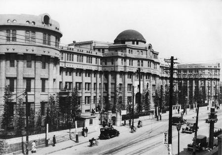 明治大学記念館